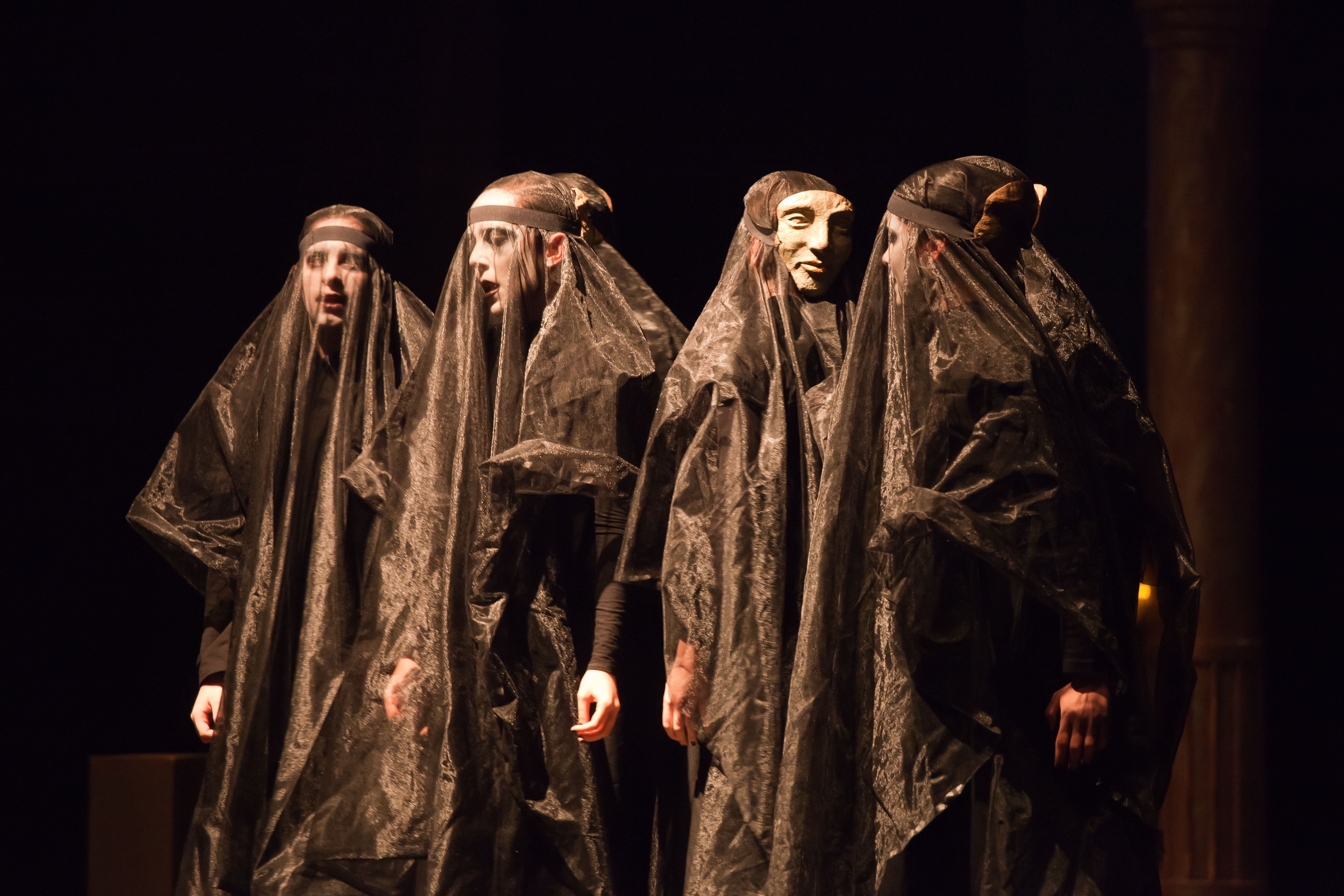 Festival de Lugo 2011 organizado por SEECGalicia. Grupo S.V. Producciones de Madrid, dirixido por Susana Verdú. © Dominio público sen restriccións o Cc-by-2.0 (Autor: Luis Miguel Bugallo Sánchez: User:Lmbuga)